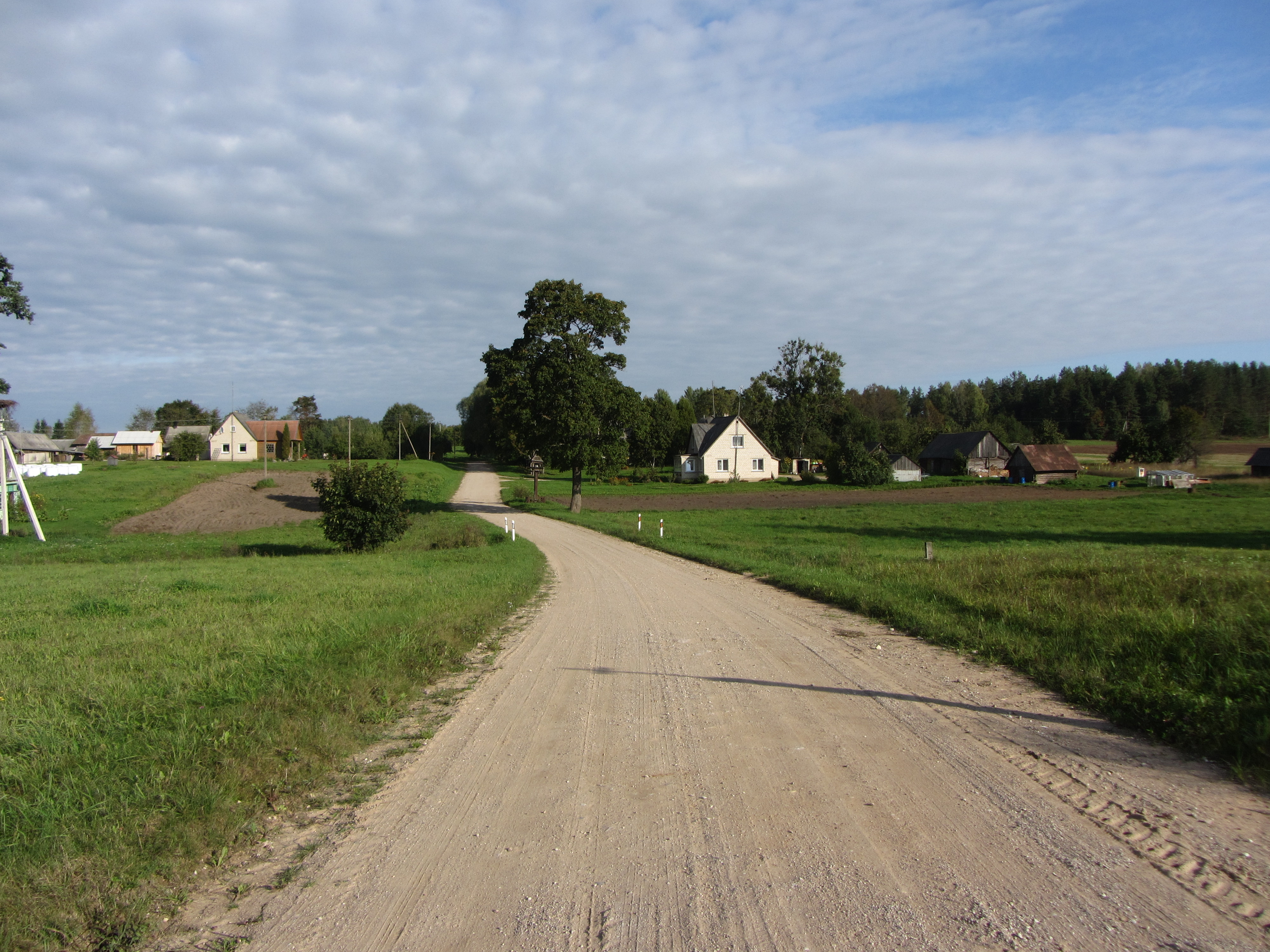 Vyželiai 32212, Lithuania